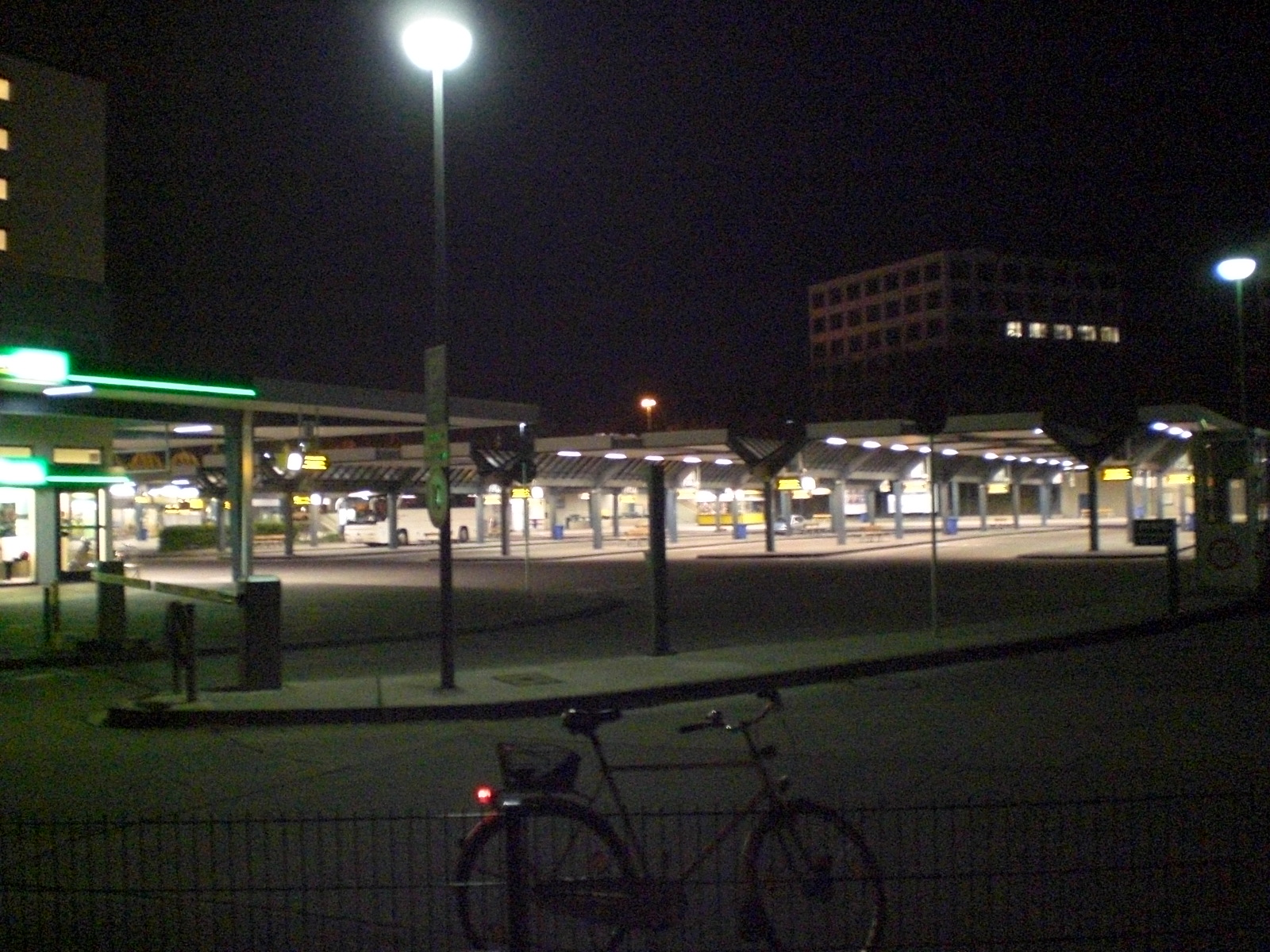 Zentraler Omnibusbahnhof (ZOB) Berlin bei Nacht